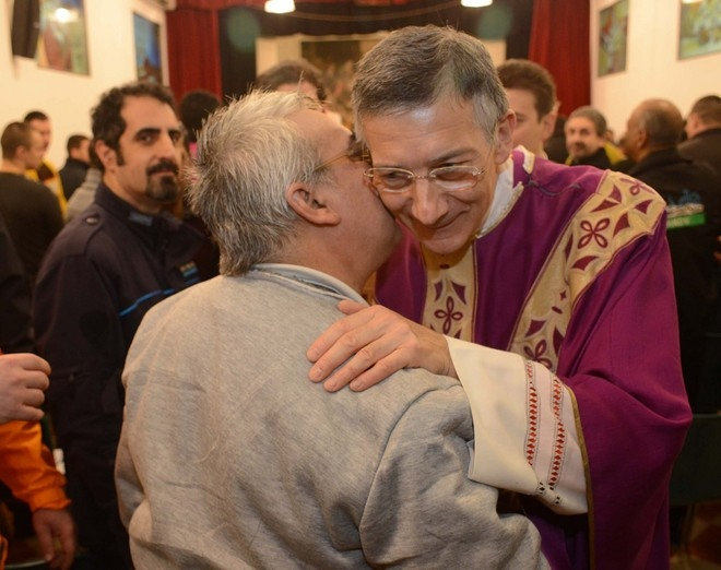 Francesco Moraglia al Carcere di Santa Maria Maggiore